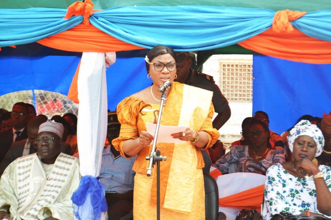 Madame le Ministre des Affaires Sociales lors d'une cérémonie au Centre National de Réhabilitation des Personnes Handicapées Cardinal Paul Emile LEGER (CNRPH-CPL) de Yaoundé, Cameroun